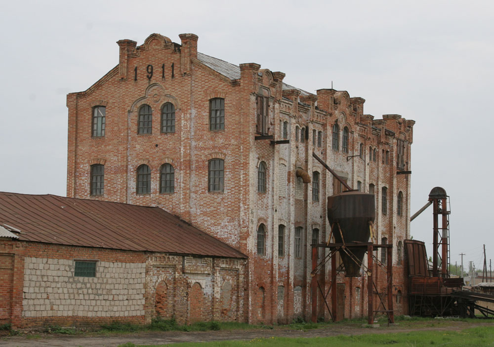 Здание мельницы в городе Красный Кут Саратовской области